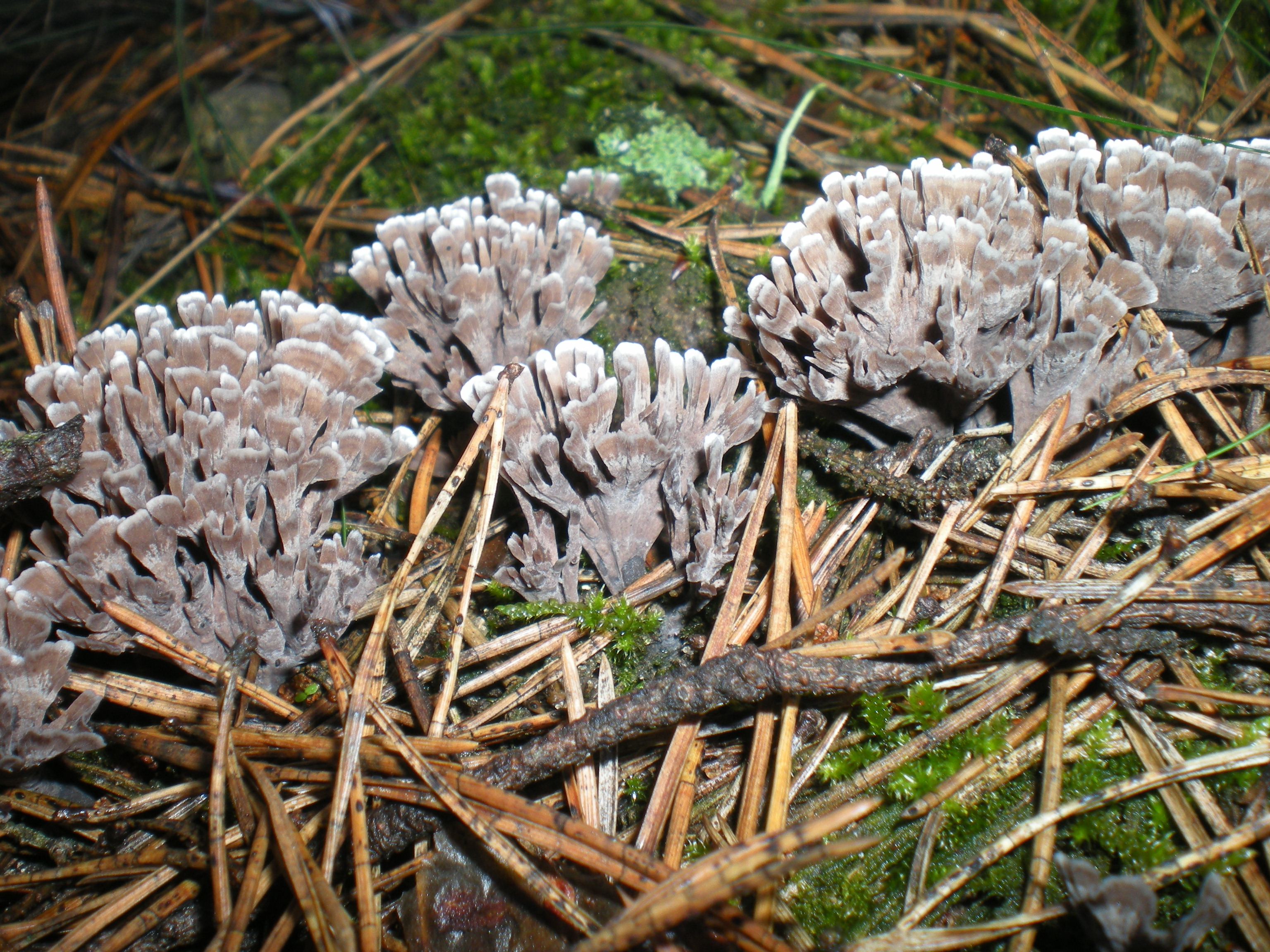 Stinkende Lederkoralle, Stinkender Warzenpilz (Thelephora palmata) in Polen